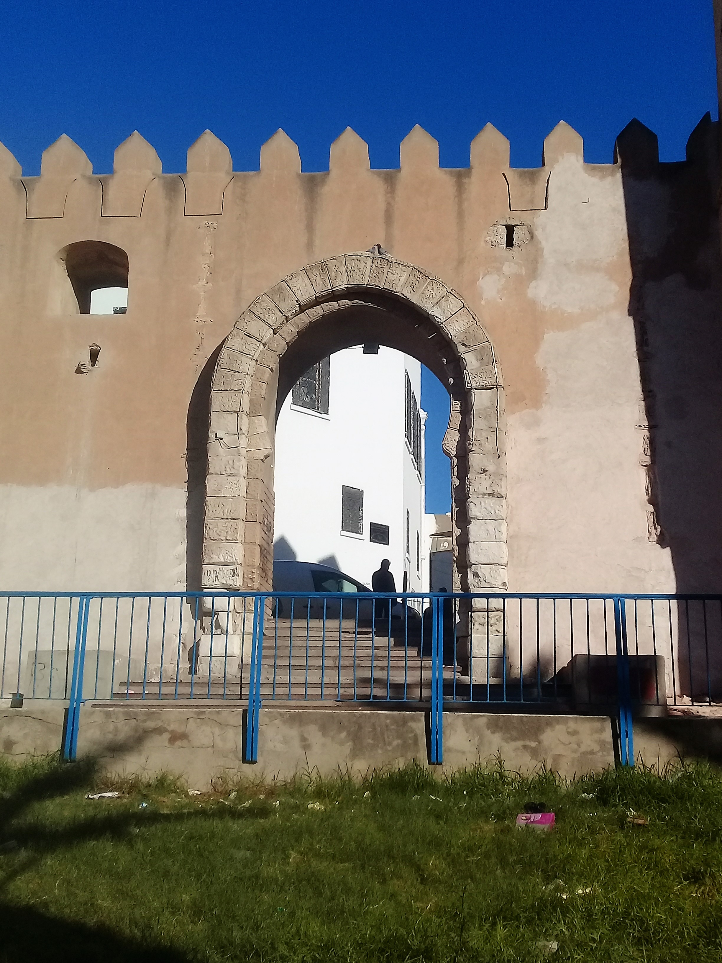 Bab Gharbi - Vue de Face